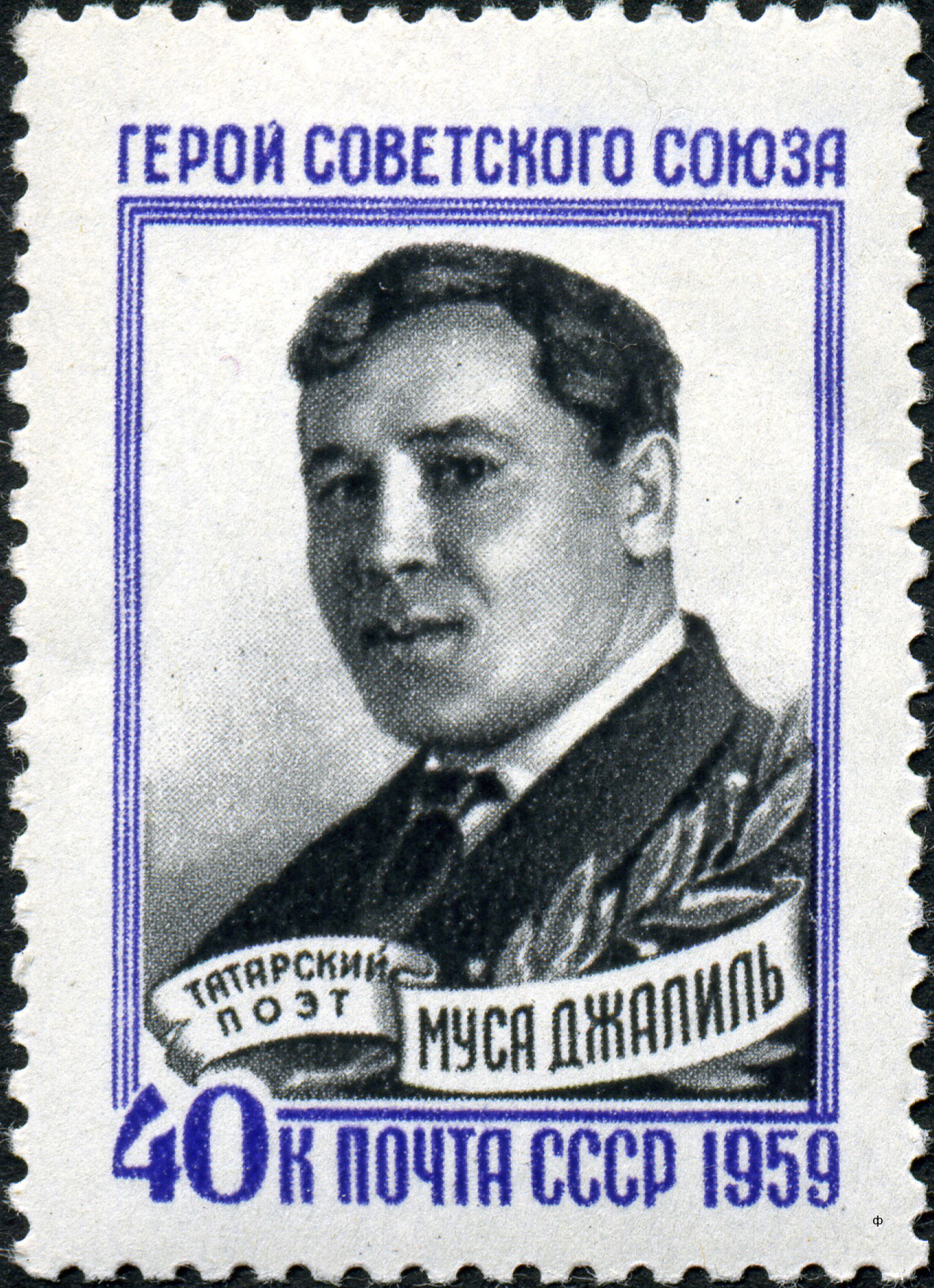 Марка СССР